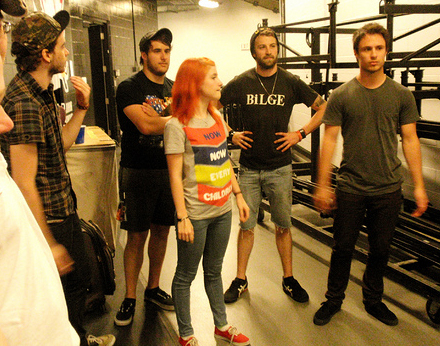 Miembros oficiales de Paramore en 2009, de izquiera a derecha: Taylor York, Zac Farro, Hayley Williams, Jeremy Davis y Josh Farro